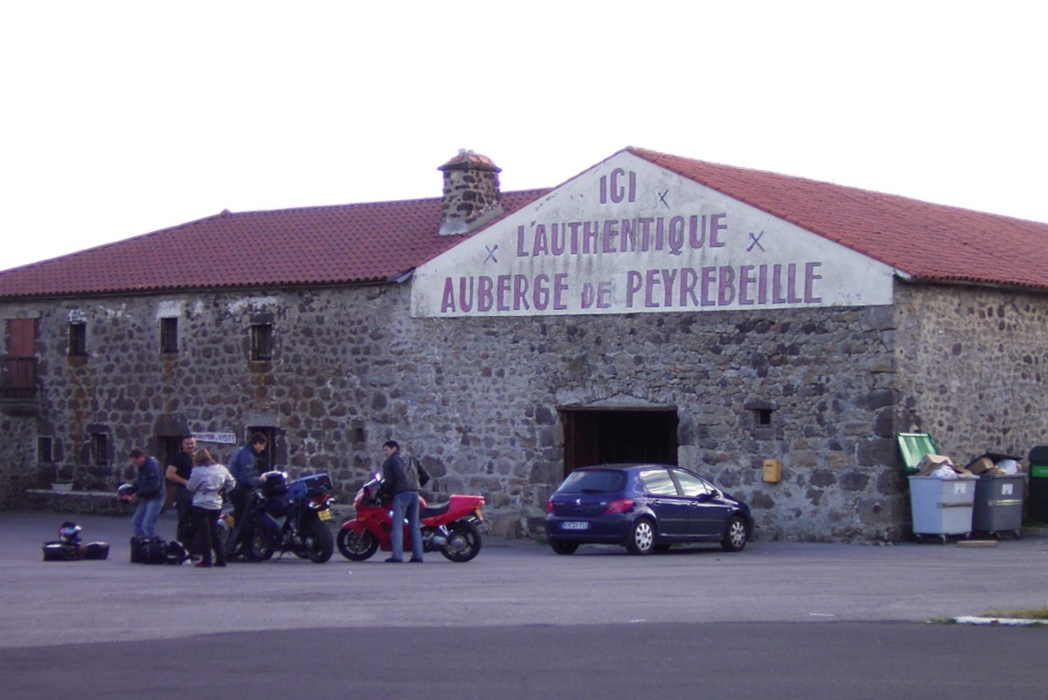 Außenansicht der Auberge Rouge